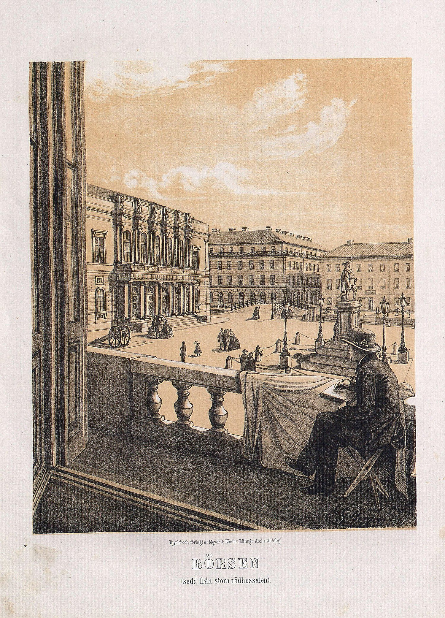 Utsikt från Stora rådhussalen över Gustav Adolfs Torg i Göteborg med Börshuset, Köpmansgatubron och Gustav Adolfs-statyn.